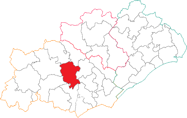 Situation du canton dans le département de l'Hérault.